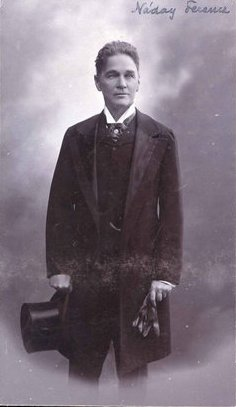 Náday Ferenc (1840-1909) kb. 60 éves korában.